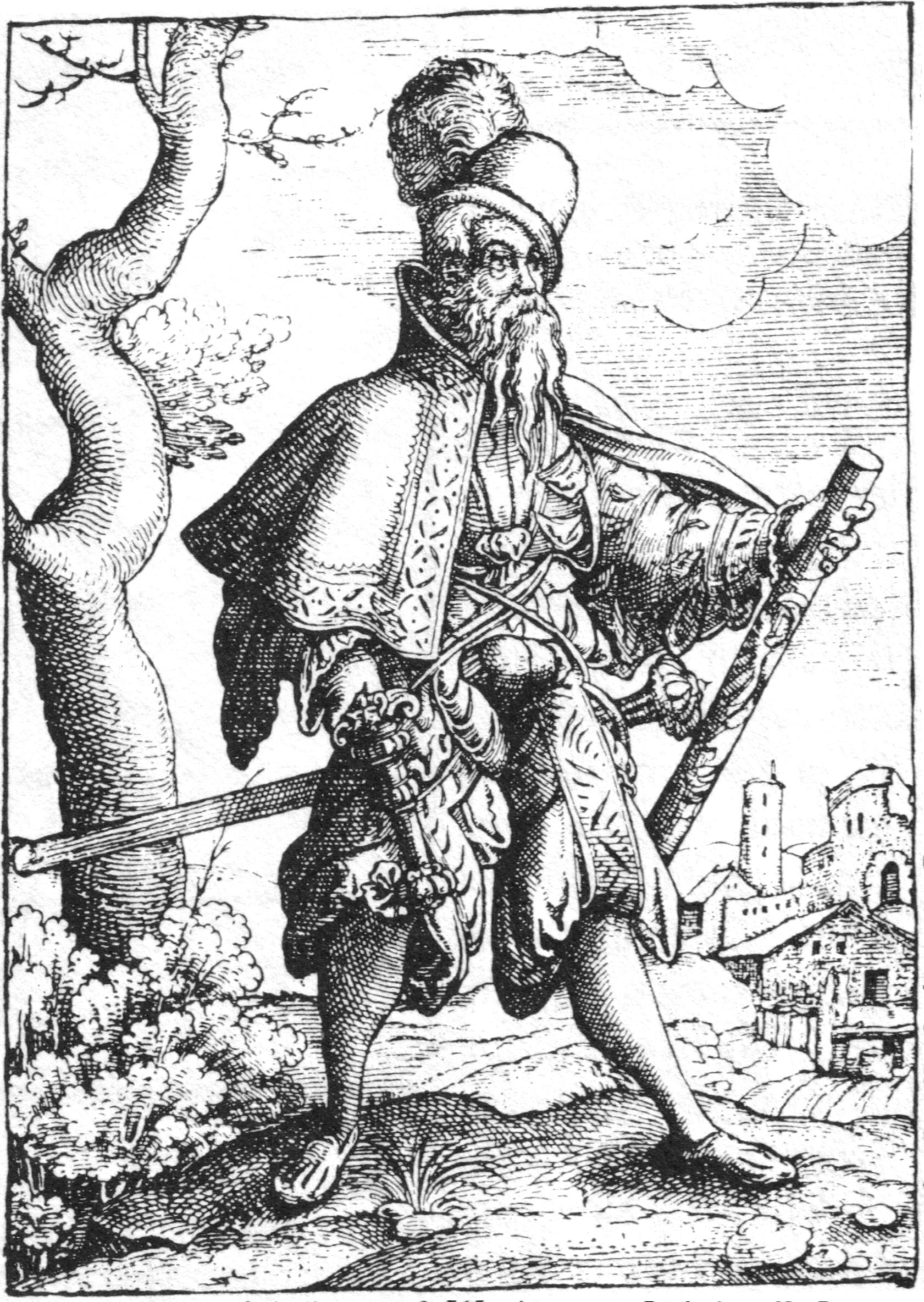 Obrist